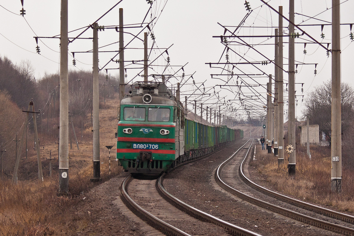 З.п. Волоське